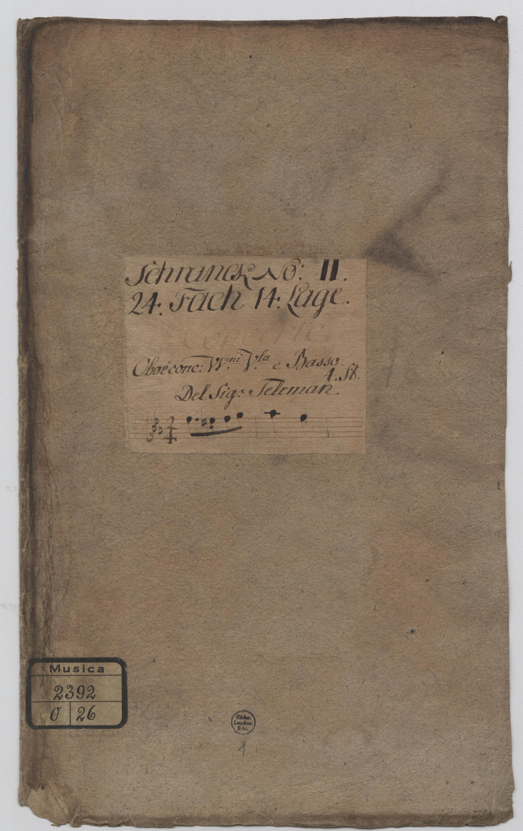 Deckblatt einber Oboensonate aus Schrank No. II von Telemann